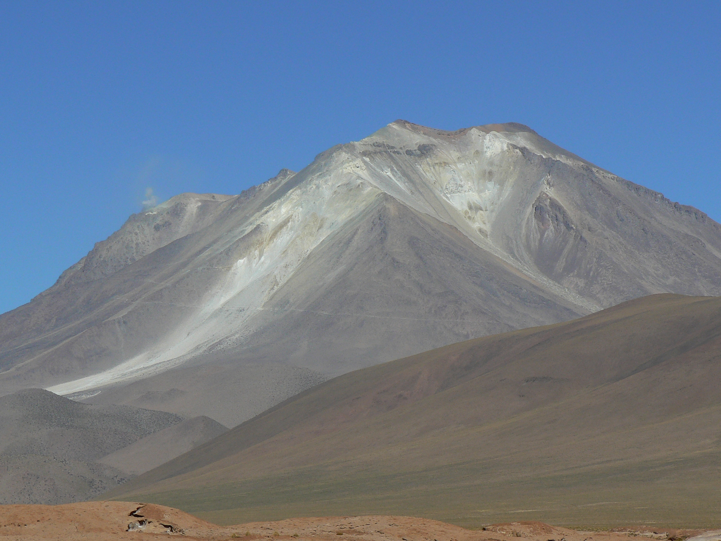 Ollagëe Volcano, Bolivia-Chile border.Volcan Ollague